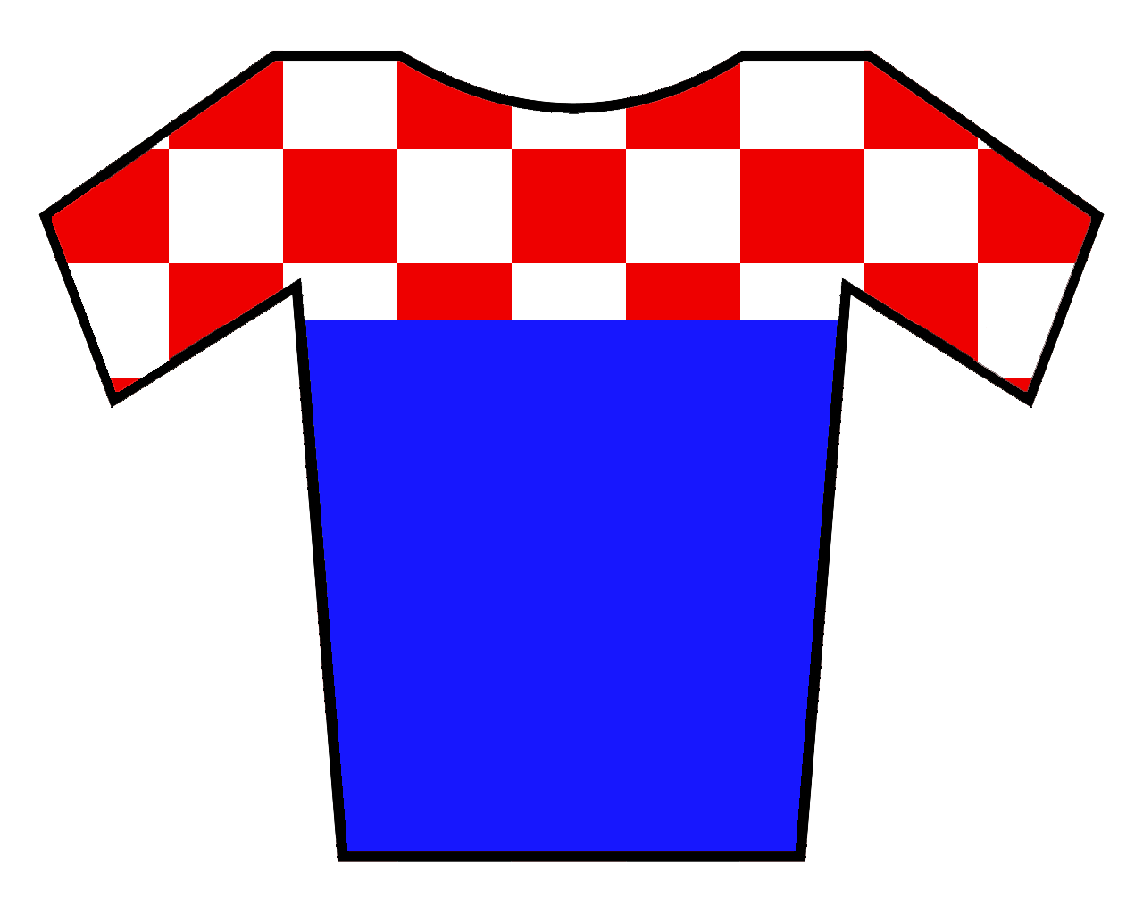 Maillot de Croacia